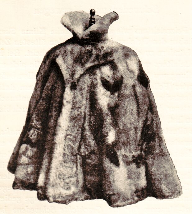 Eider-duck skin pelerine, Norway / Pelerine aus Eiderentenfell. Pelerine aus Eiderentenfellen. Model der Firma Brandt in Bergen, Norw.